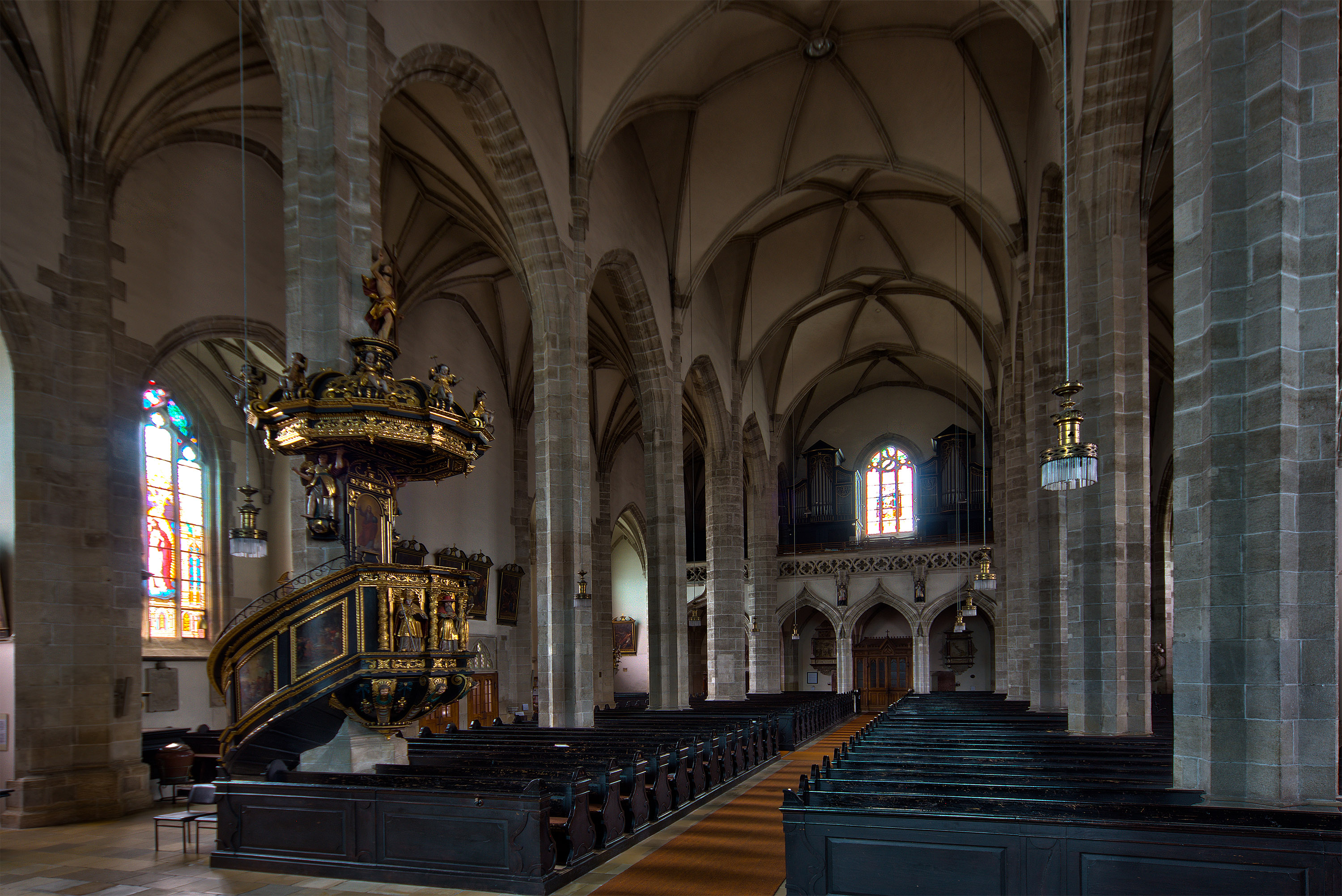 Stadtpfarrkirche Eferding. Das Kirchenschiff gegen Chor und Kanzel.